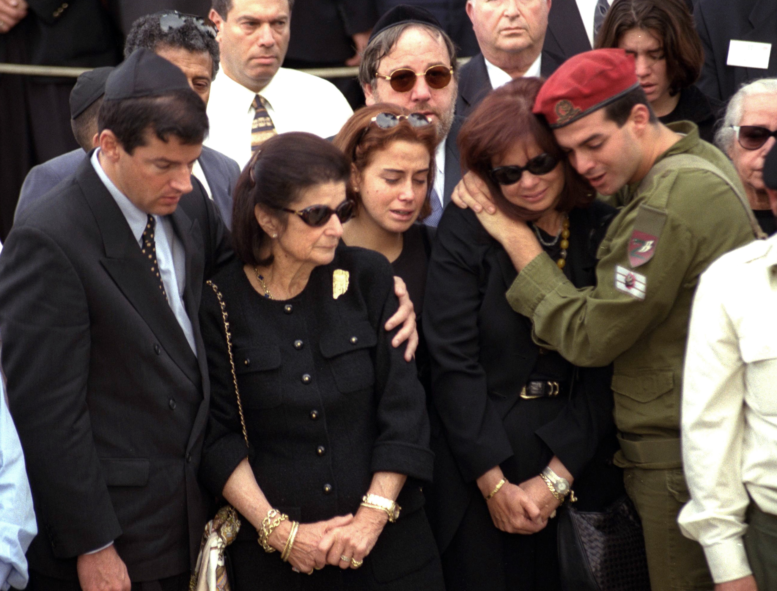 THE FAMILY OF SLAIN P.M. YITZHAK RABIN AT HIS FUNERAL. (L TO R) SON YUVAL, WIDOW LEAH, GRANDDAUGHER NOA BEN ARTZI, DAUGHTER DALIA FILOSOF AND GRANDSON YONATAN. . משפחת רבין בהלווית יקירם ראש הממשלה יצחק רבין אשר נרצח ע"י מתנקש בעצרת למען השלום בכיכר מלכי ישראל בתל אביב. מימין לשמאל, (החייל) הנכד יהונתן בן ארצי, הבת דליה פילוסוף, הנכדה נועה בן ארצי, לאה רבין והבן יובל רבין. Photo: ISRAELI TSVIKA: GPO, 06/11/1995.